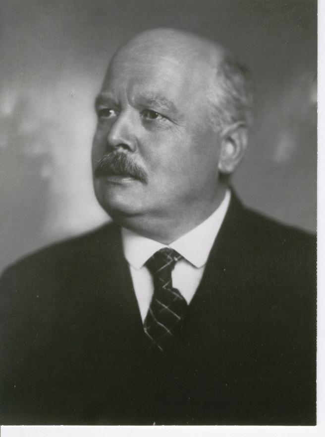 Prof. Dr. Josef Müller